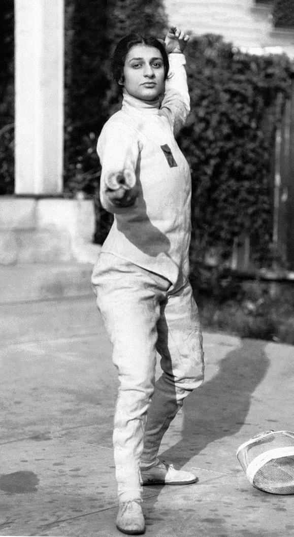 Jeanne Vical, championne du tournoi d'escrime féminin de Californie, s'entraîne à Los Angeles, Californie, Etats-Unis en 1930.